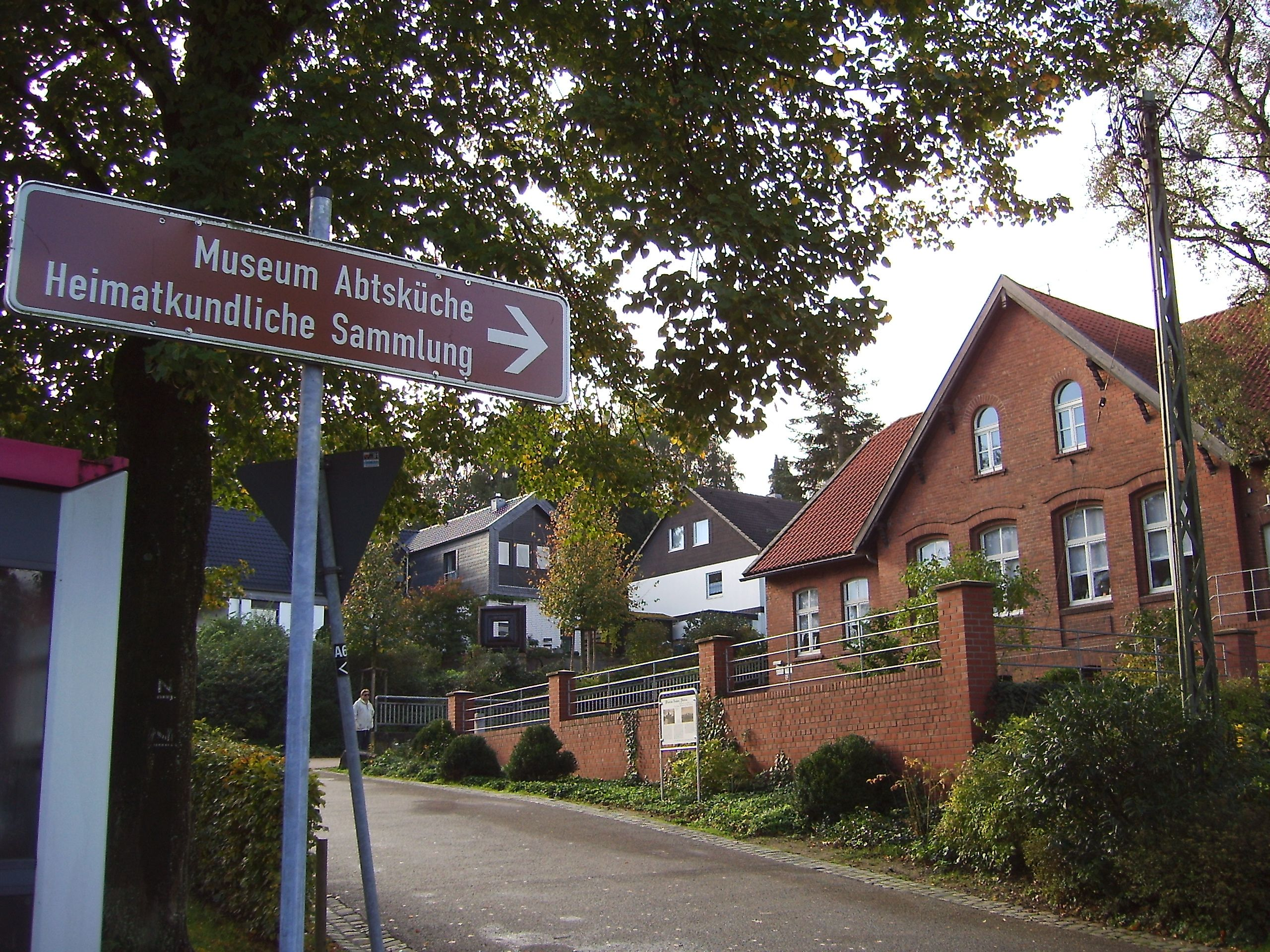 Abtsküche Museum links neben Kapelle, Heiligenhaus This is a photograph of an architectural monument.